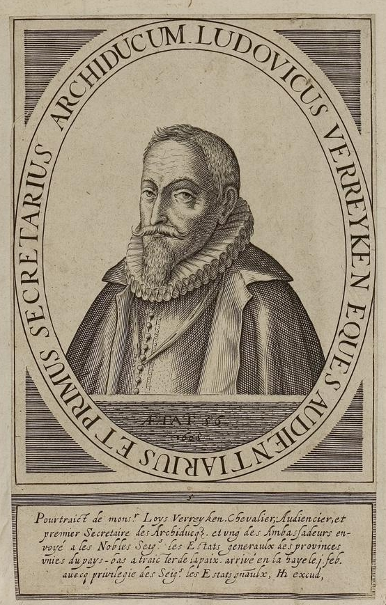 Grafik aus dem Klebeband Nr. 1 der Fürstlich Waldeckschen Hofbibliothek Arolsen Motiv: Ludowicus Verreyken" (Lodewijk/Louis Verreycken)